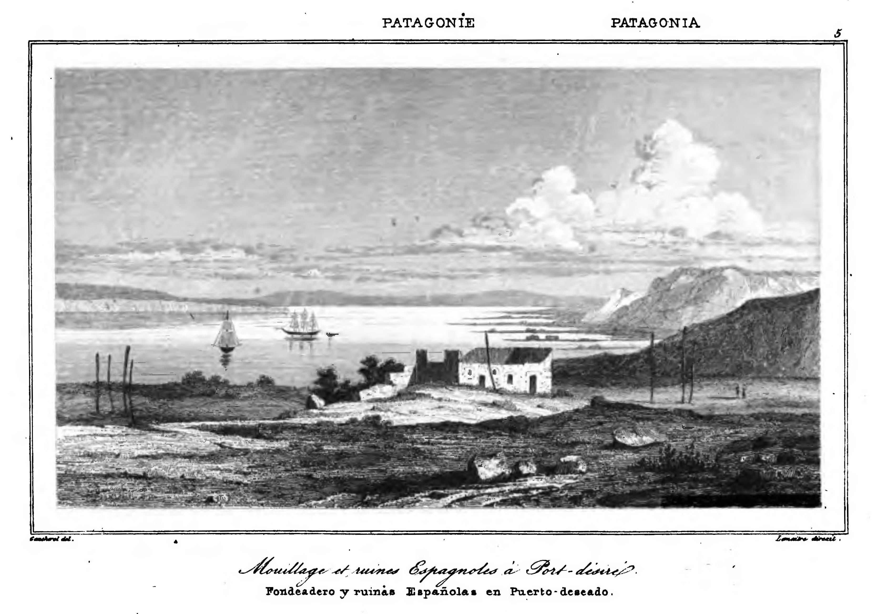 Página 53 de Historia de la Patagonia, Tierra de Fuego, é Islas Malvinas. Barcelona, 1841.